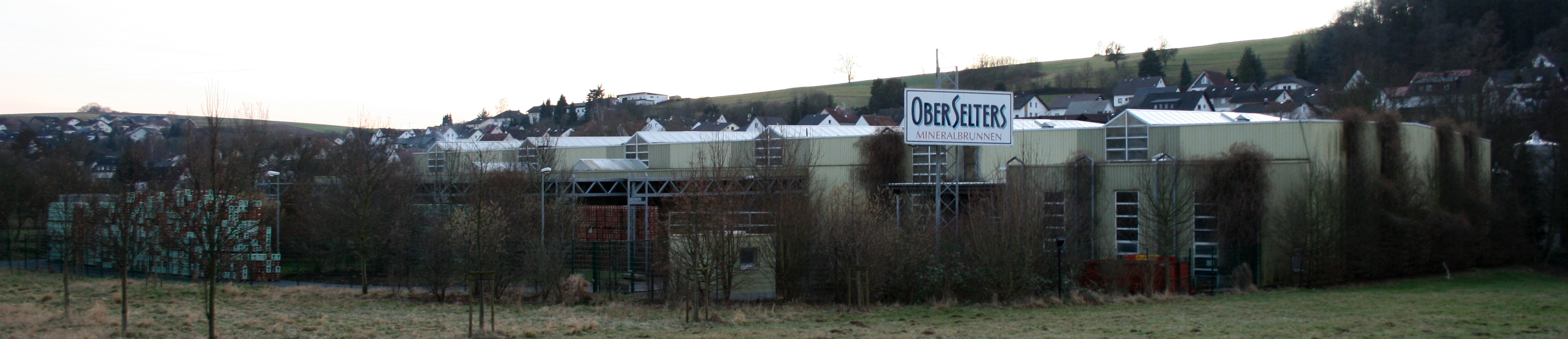 Mineralbrunnen Bad Camberg-Oberselters, Deutschland